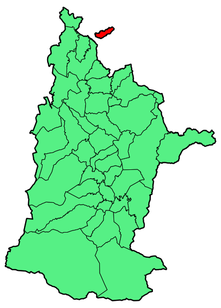 Aipaturiko udalerriaren kokapena Zuberoan